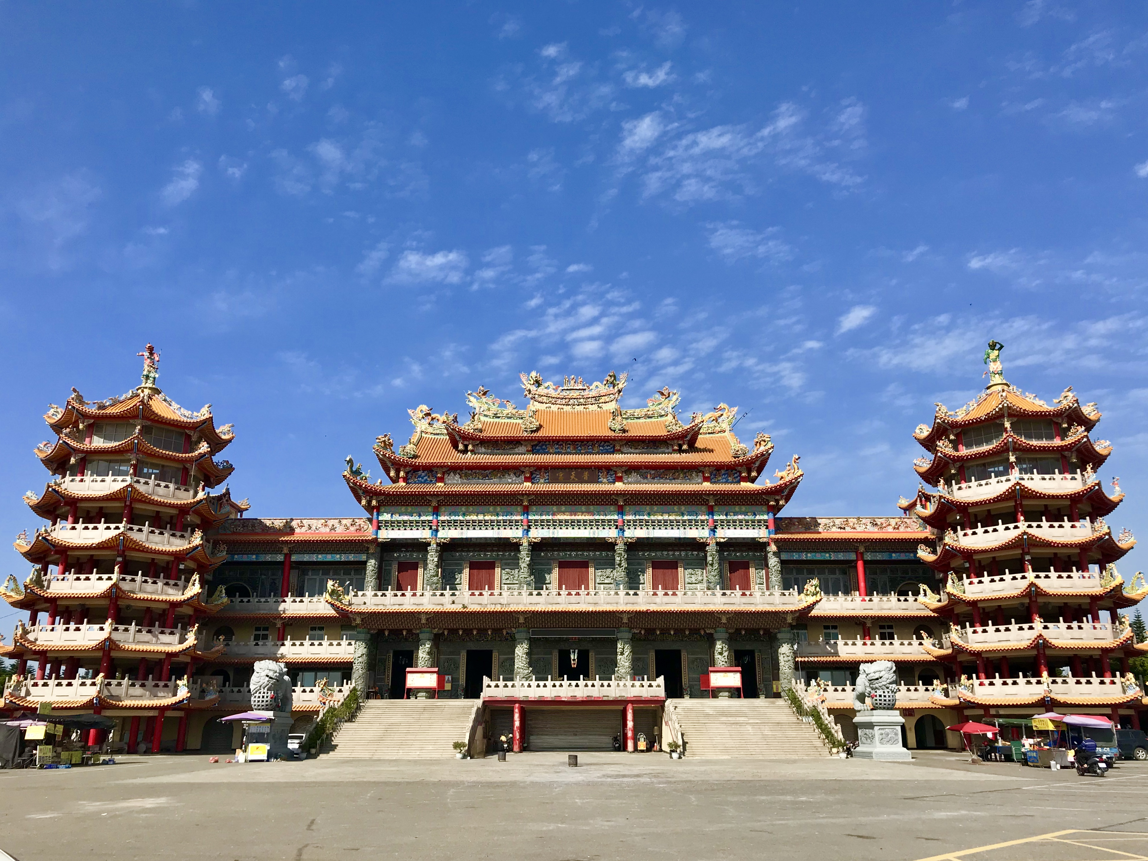 芳苑白馬峰普天宮正面照